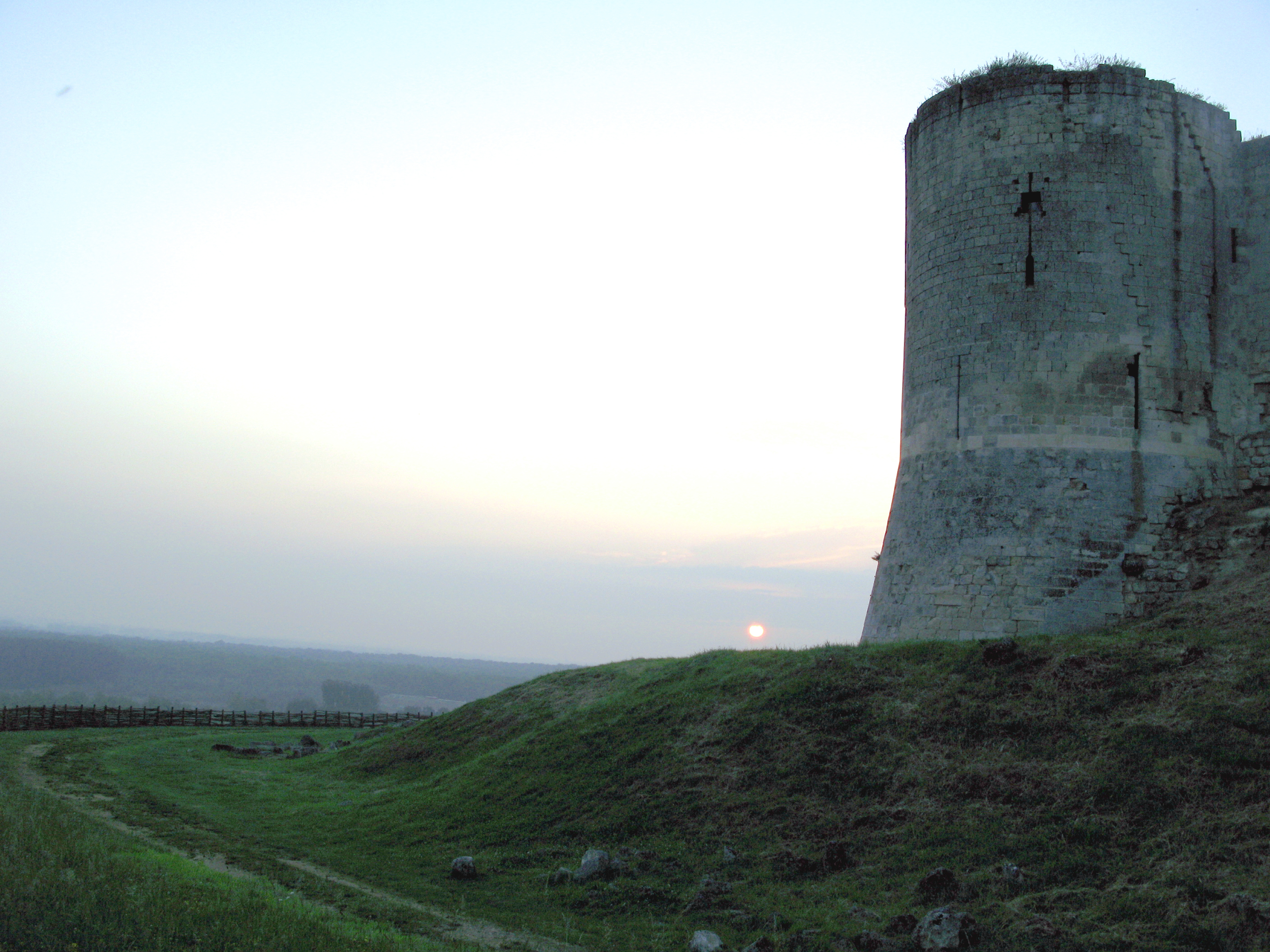 Coucy-le-Château (Aisne, France) - Tour d'angle au soleil couchant. On remarque de la végétation tout au sommet de la tour.